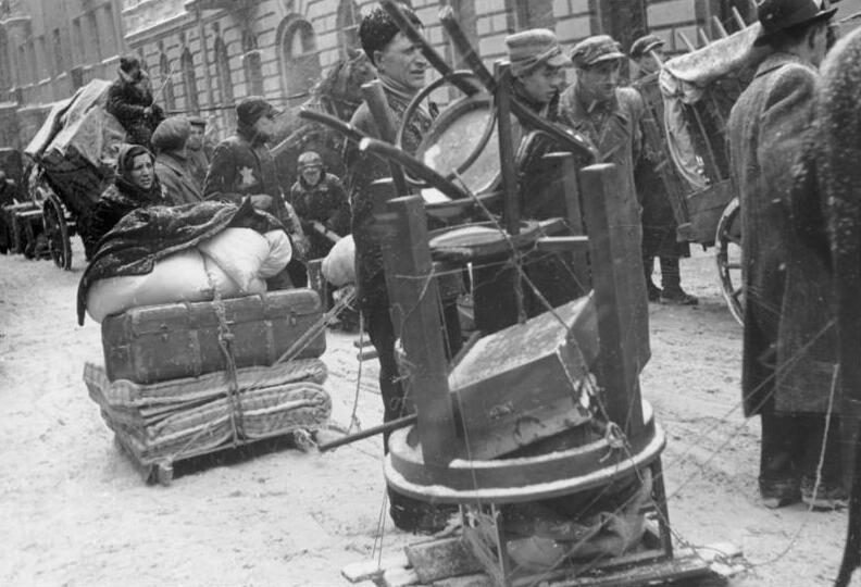 Ghetto Litzmannstadt, Deportation Litzmannstadt. D.[eutsches] R.[eich] Auszug der Juden aus Litzmannstadt.